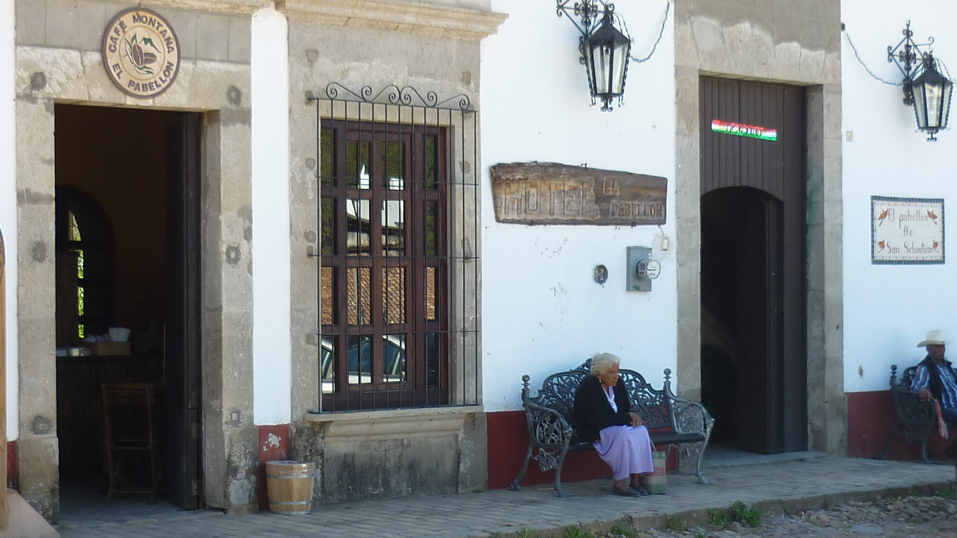 Pueblo mágico jalisciense